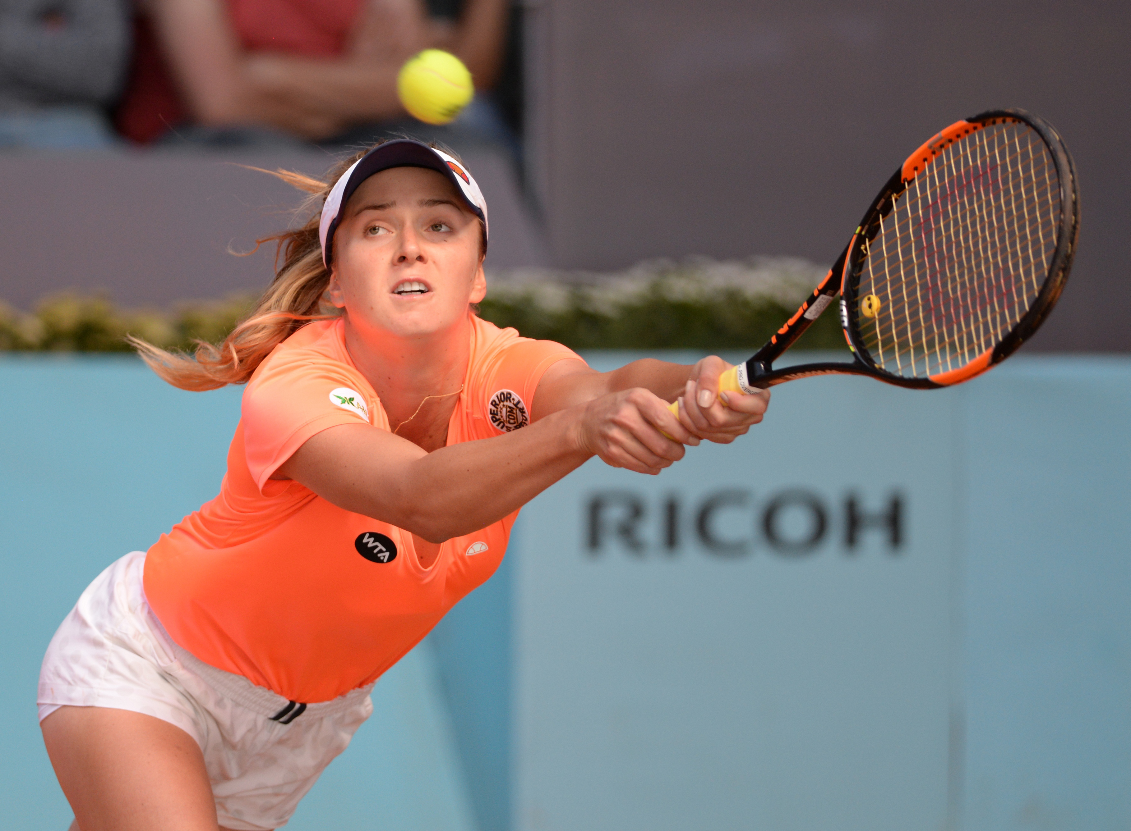 Elina Svitolina